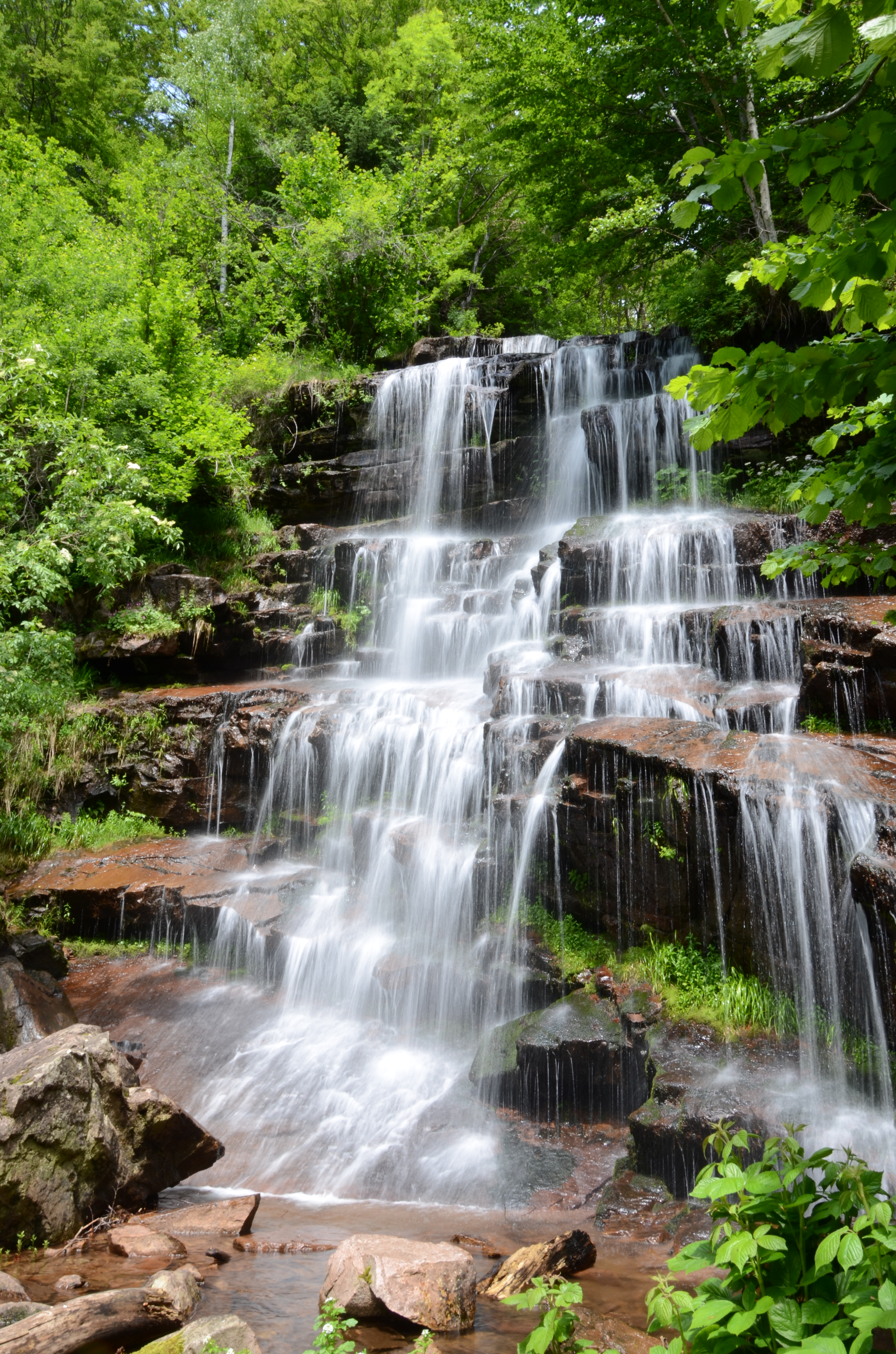 Српски (ћирилица): Ово је фотографија заштићеног природног добра у Србији под шифром: ПП16 This is a a photo of a natural area in Serbia with ID: ПП16 Водопад Тупавица на Старој планини налази се у близини села Дојкинци на 1050 метара надморске висине. Висина водопада је око 15 метара.